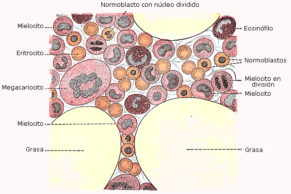 Esquema de la médula ósea roja con algunas de sus principales células.